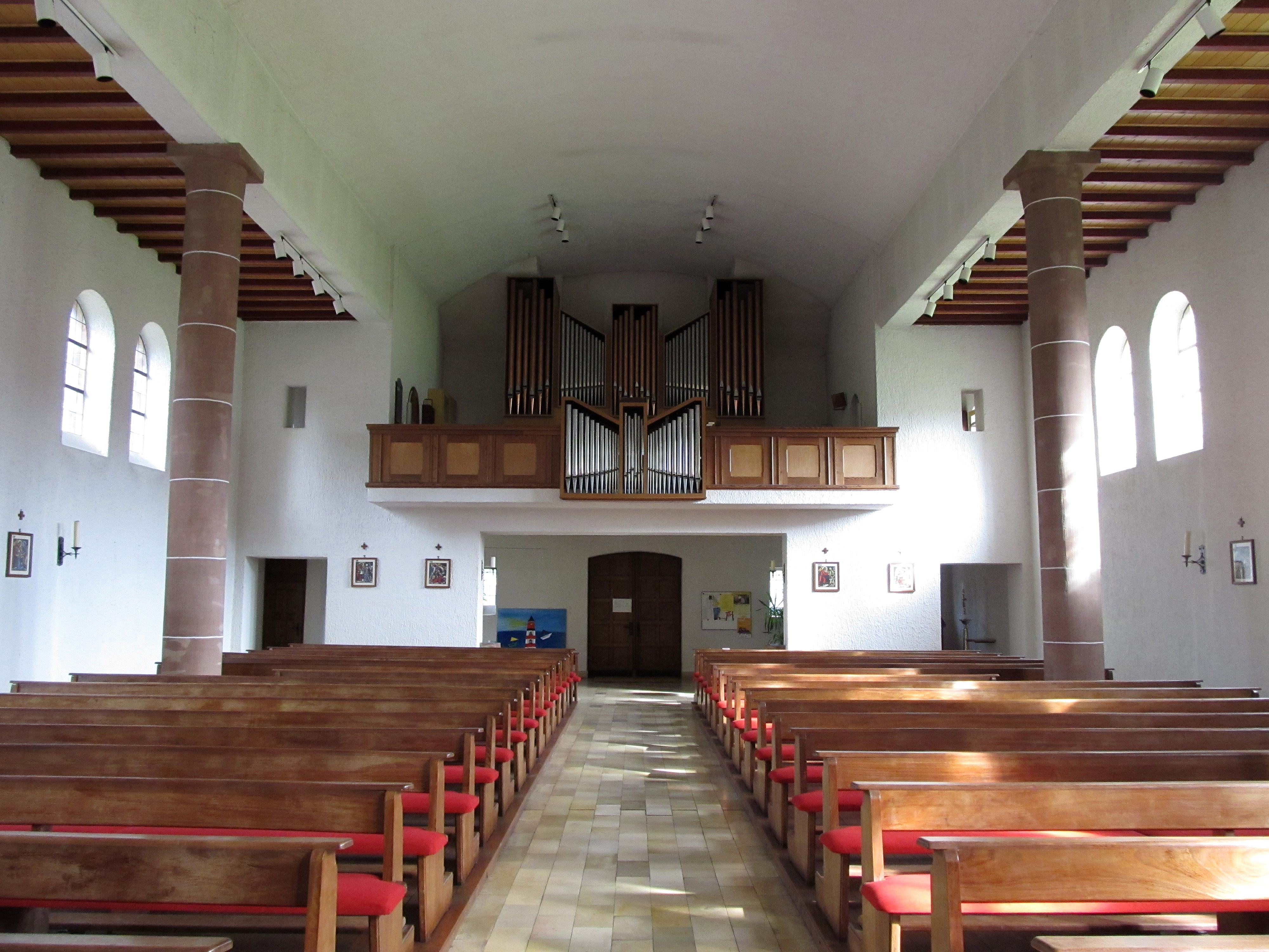 Blick ins Innere der katholischen Pfarrkirche Maria Königin der Engel in Stanbach, Gemeinde Contwig, Rheinland-Pfalz